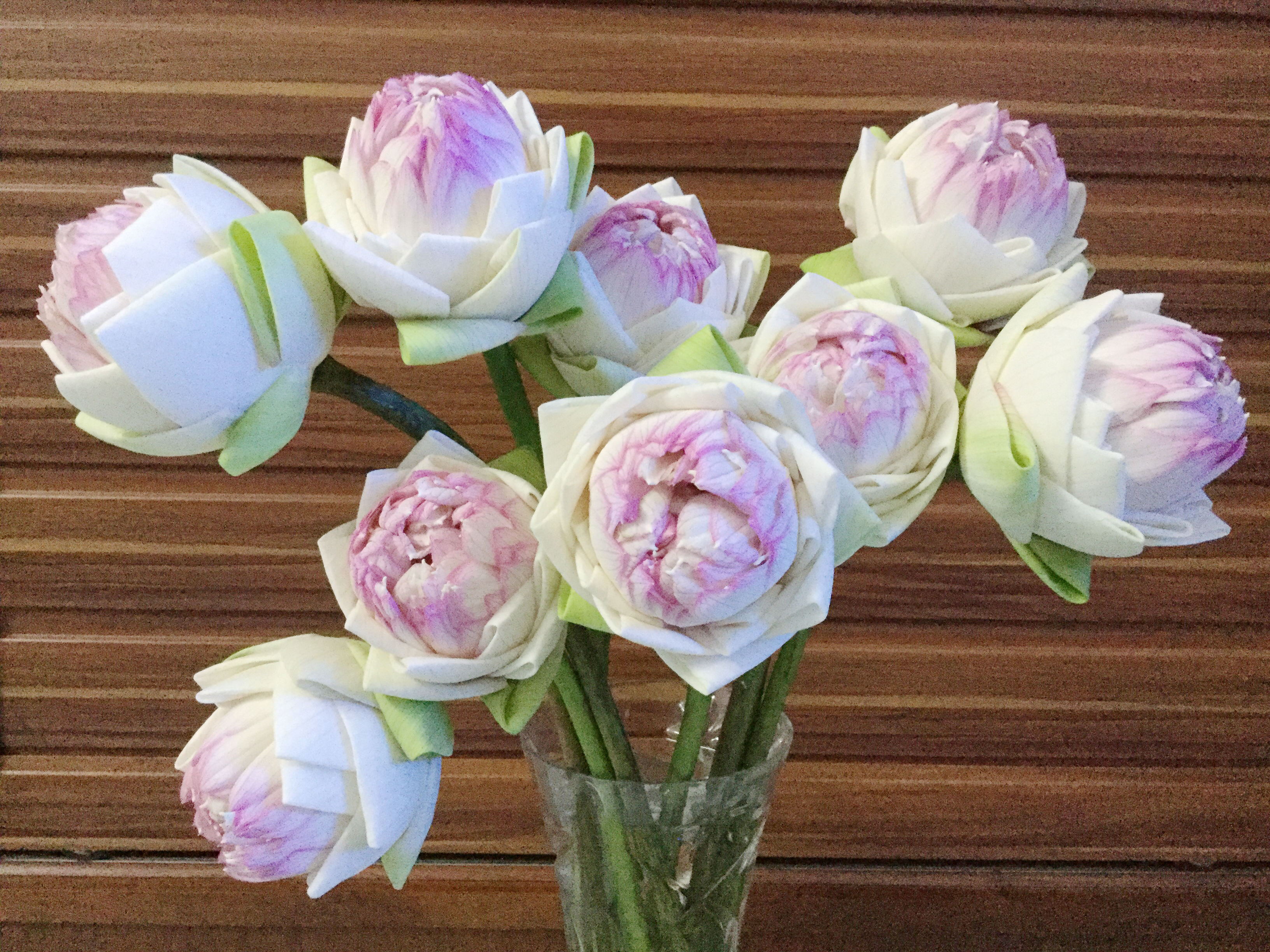 พับดอกบัว